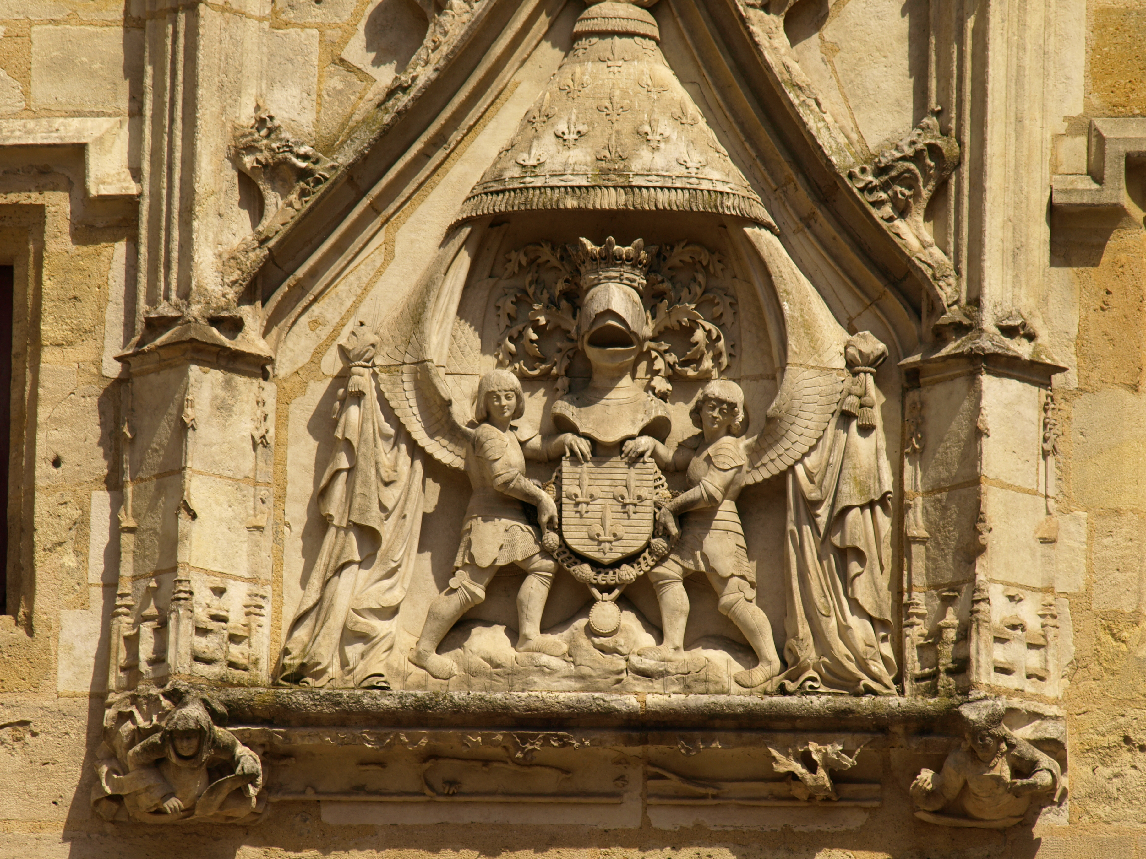 La porte Cailhau à Bordeaux, en Gironde .